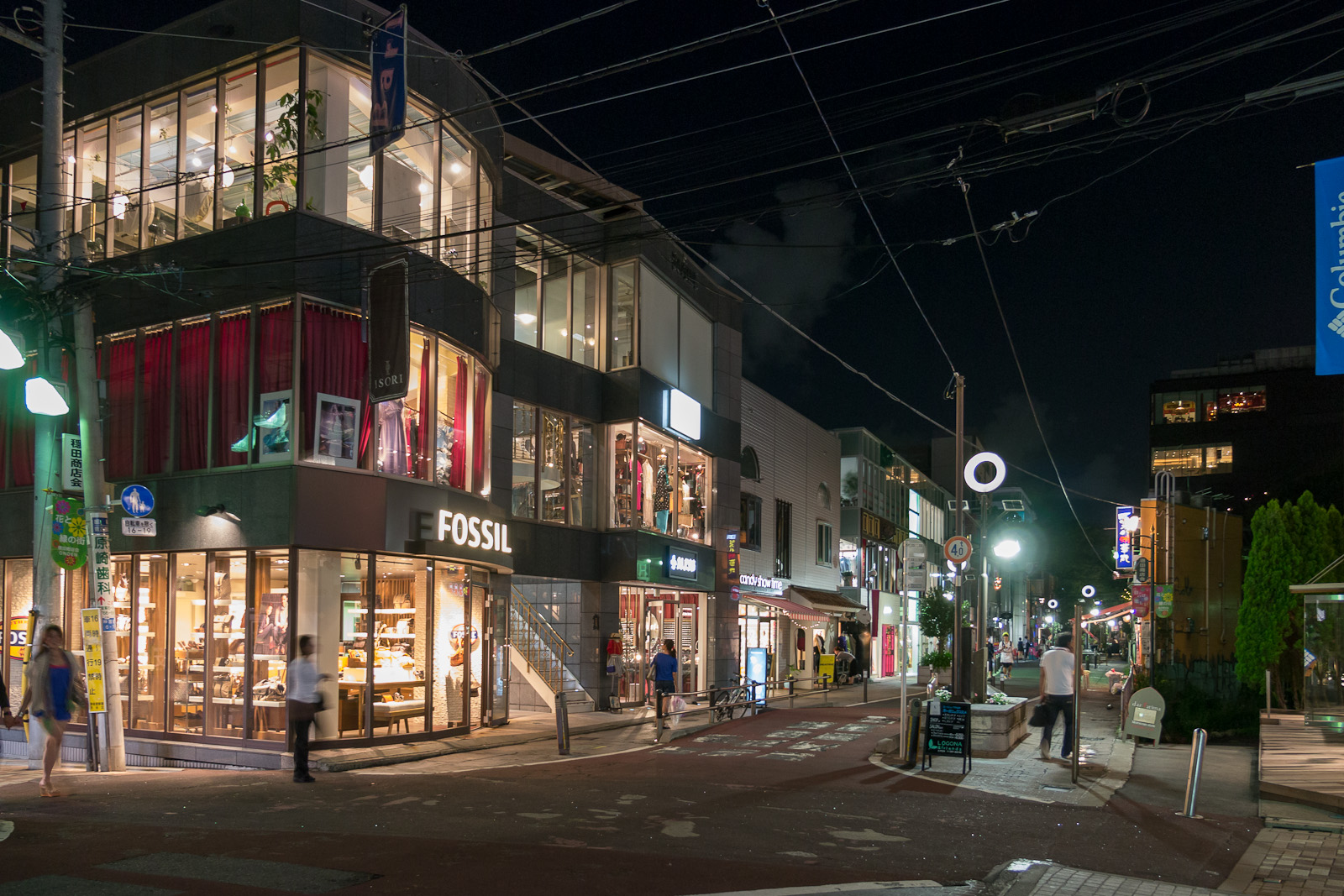 原宿キャットストリート、旧渋谷川遊歩道。東京都渋谷区神宮前、旧穏田橋付近。